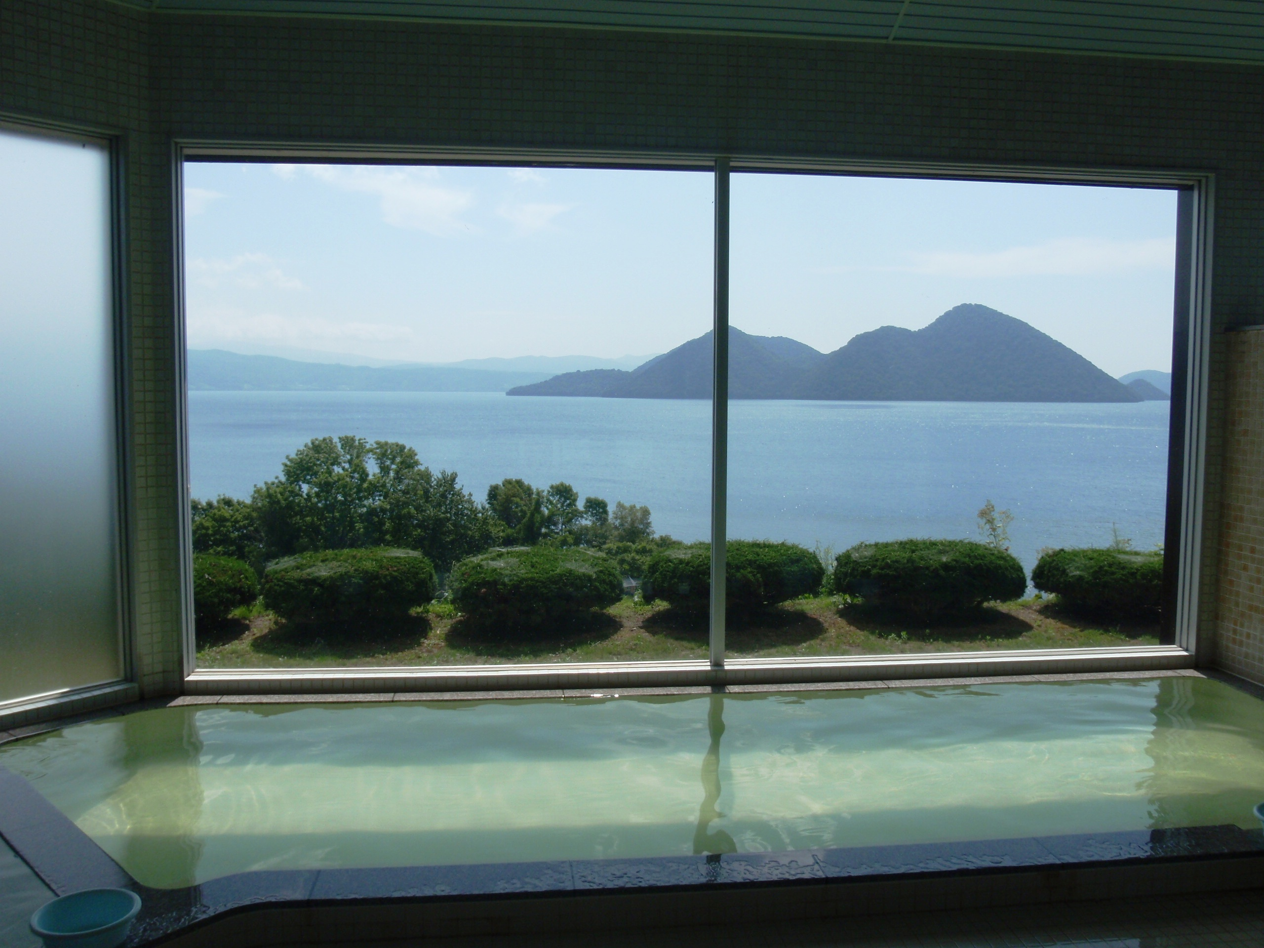 洞爺温泉、洞爺いこいの家の浴室から見る洞爺湖。